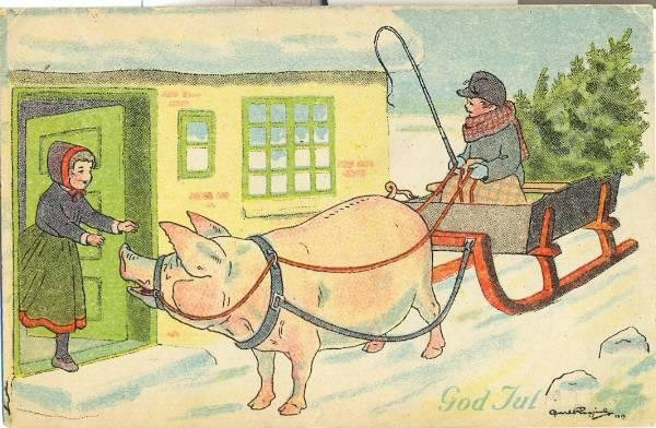 Julekort tegnet af Carl Røgind (død 1933)